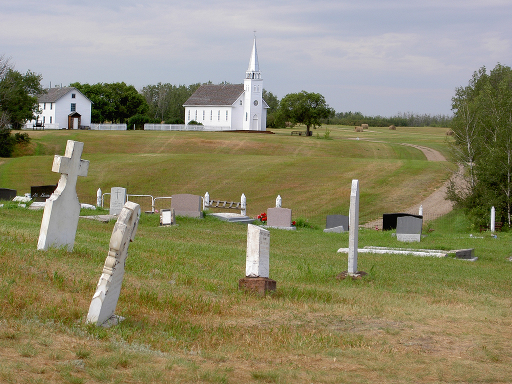 Village de Batoche, église Saint-Antoine-de-Padoue et cimetière